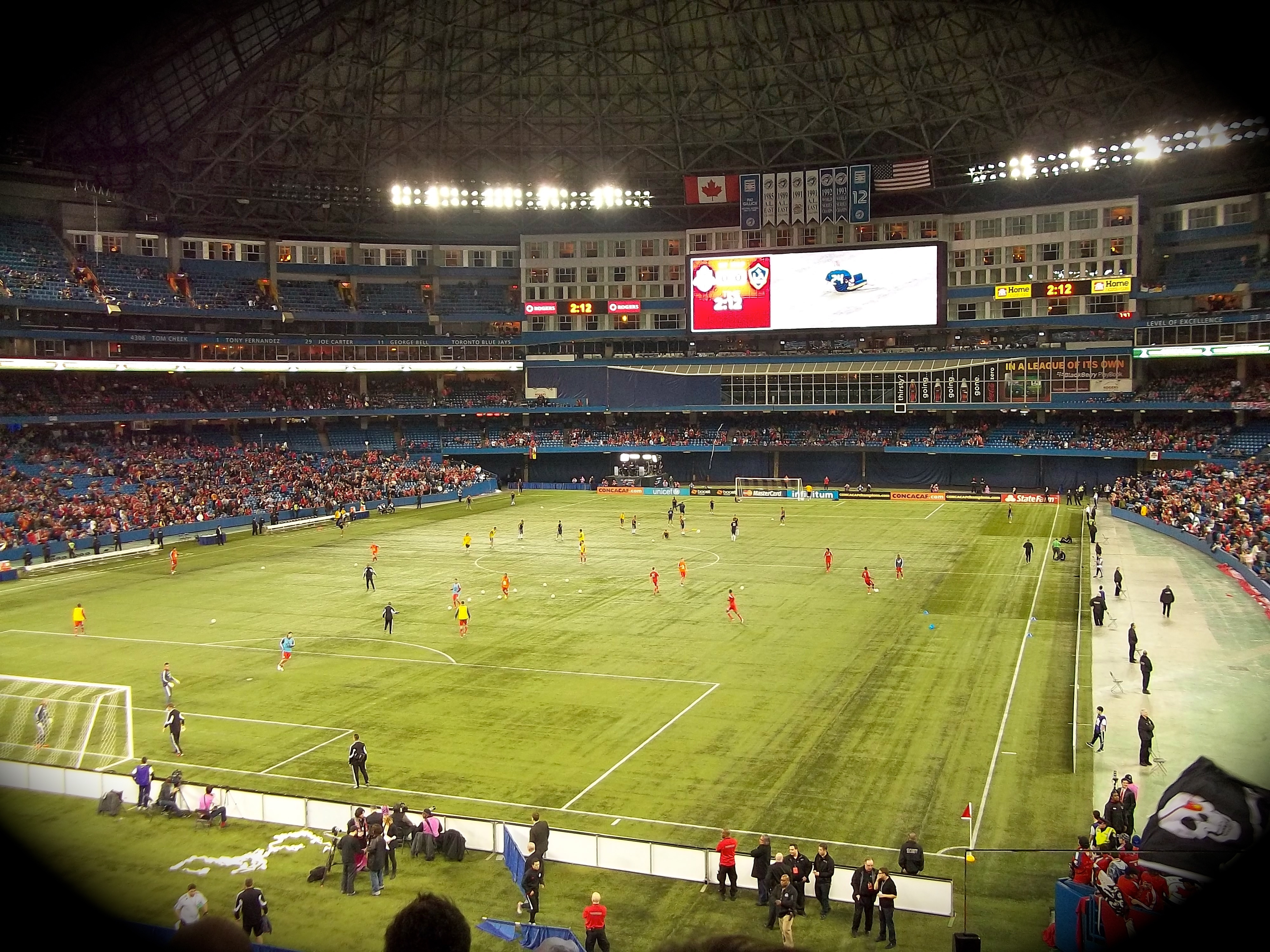 Rogers Centre - TFC vs Galaxy